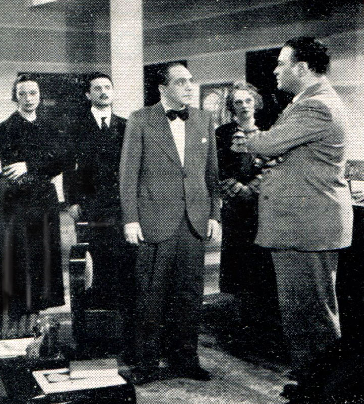 L'anonima Roylott film del 1936 diretto da Raffaello Matarazzo. Foto di scena con da sin Olga Solbelli, Paolo Stoppa, Giulio Donadio, Cesarina Gheraldi e Camillo Pilotto